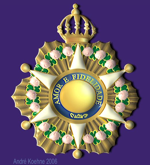 Medalhão da Imperial Ordem da Rosa (Brazilian Royalty) Image by: André Koehne